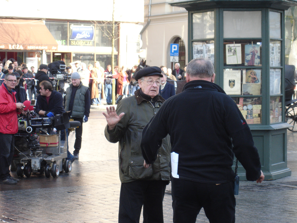 Andrzej Wajda na planie filmu Post mortem. Opowieść katyńska, Kraków 21 listopad 2006, zdjęcie palkin